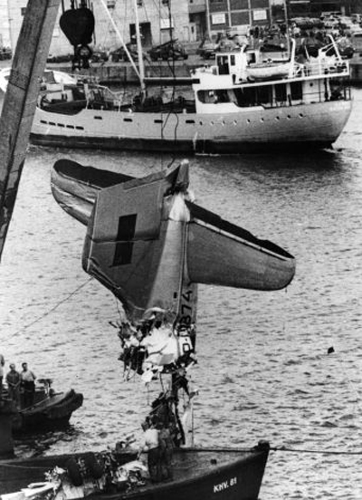 Последствия катастрофы самолёта Ил-14 борт СССР-Л1874, разбившегося 15 августа 1957 года в Копенгагене